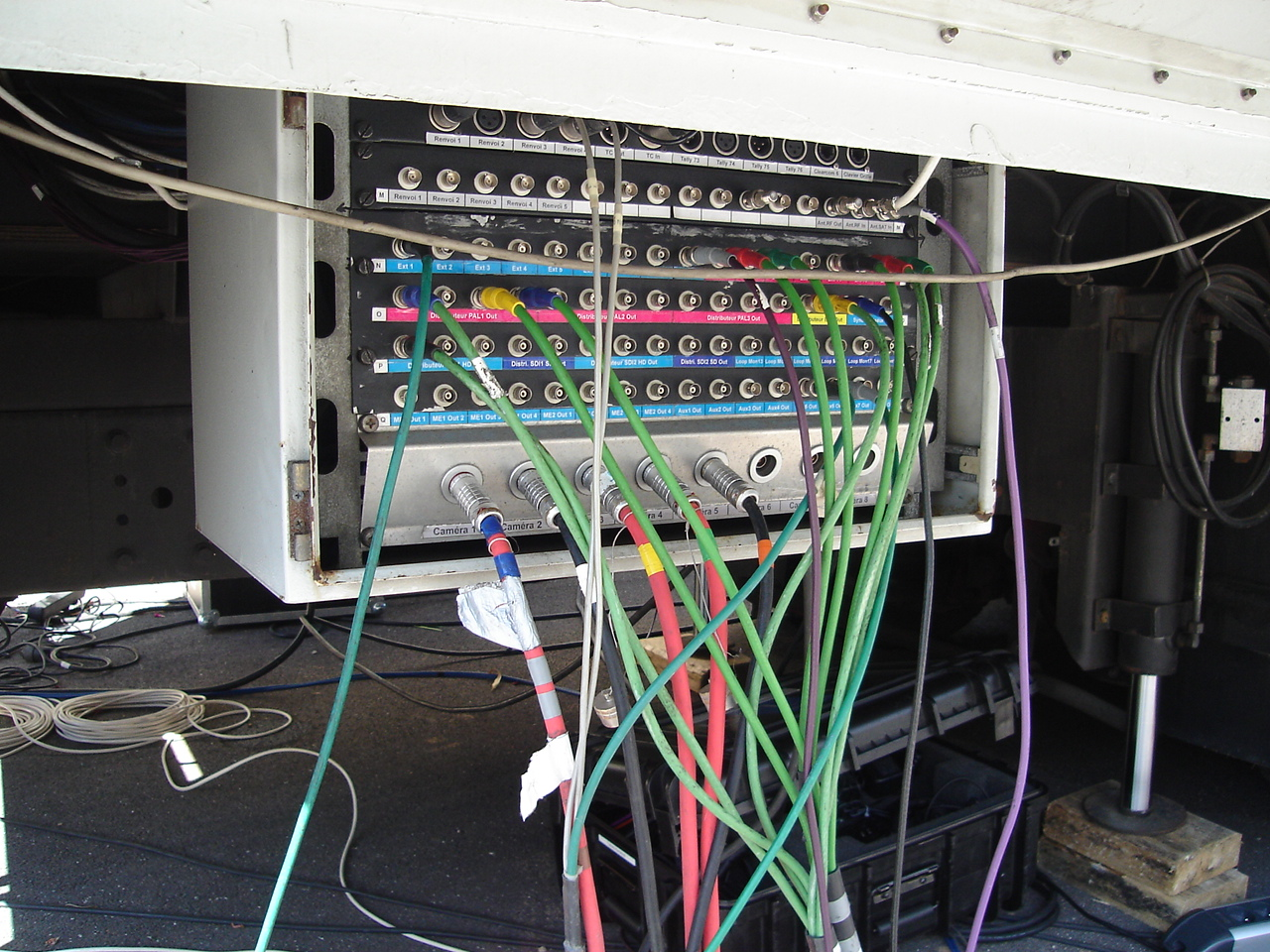 Patch avec câbles audio/vidéo/données arrivant à la régie mobile.